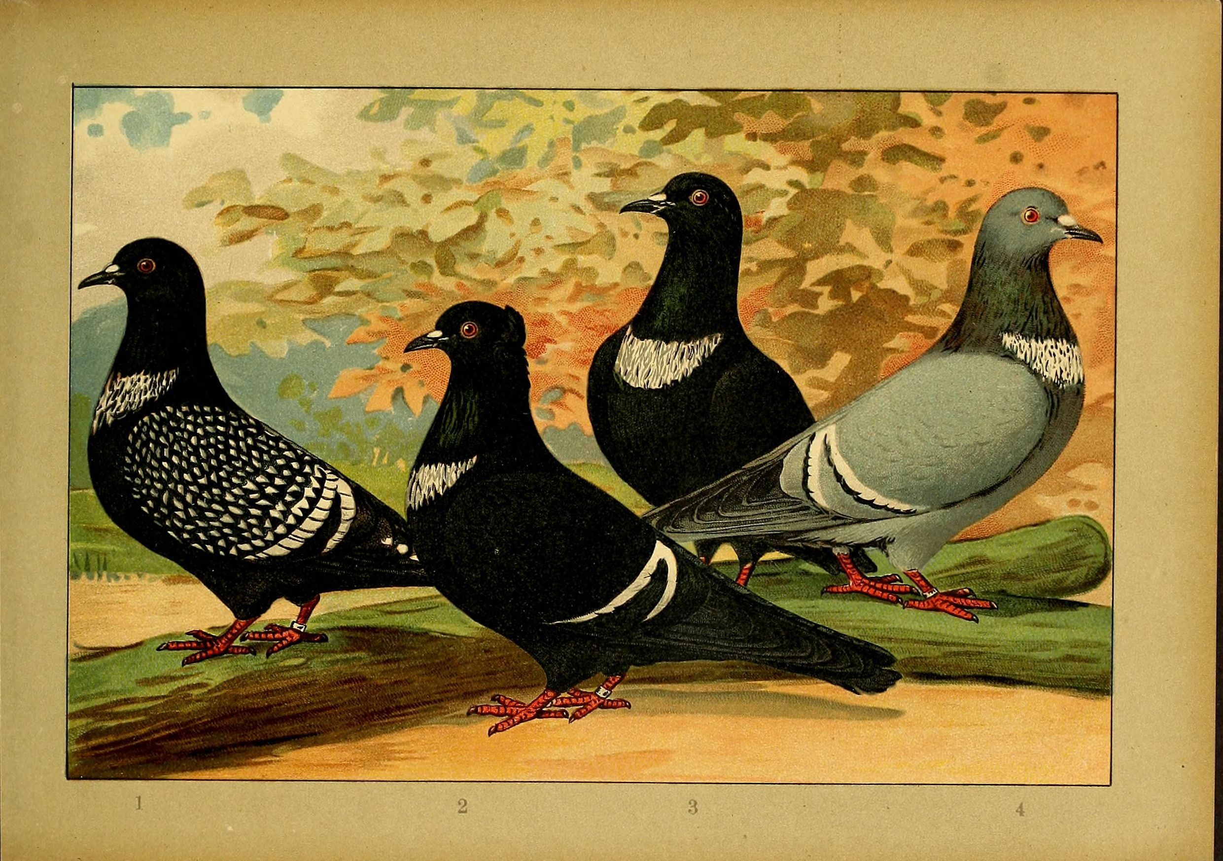 Deutsch